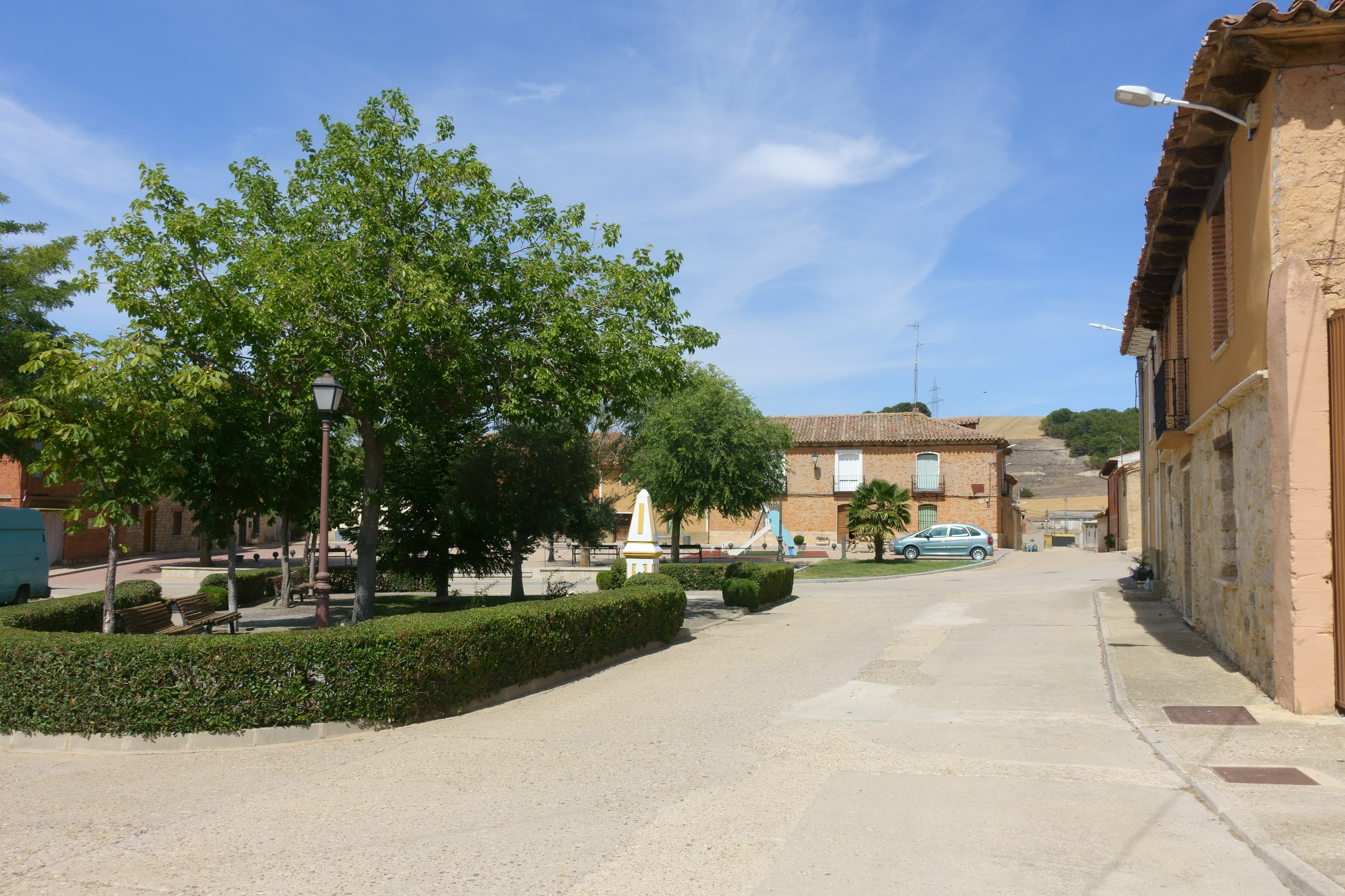 Plaza Mayor de Valverde de Campos (Valladolid, España).